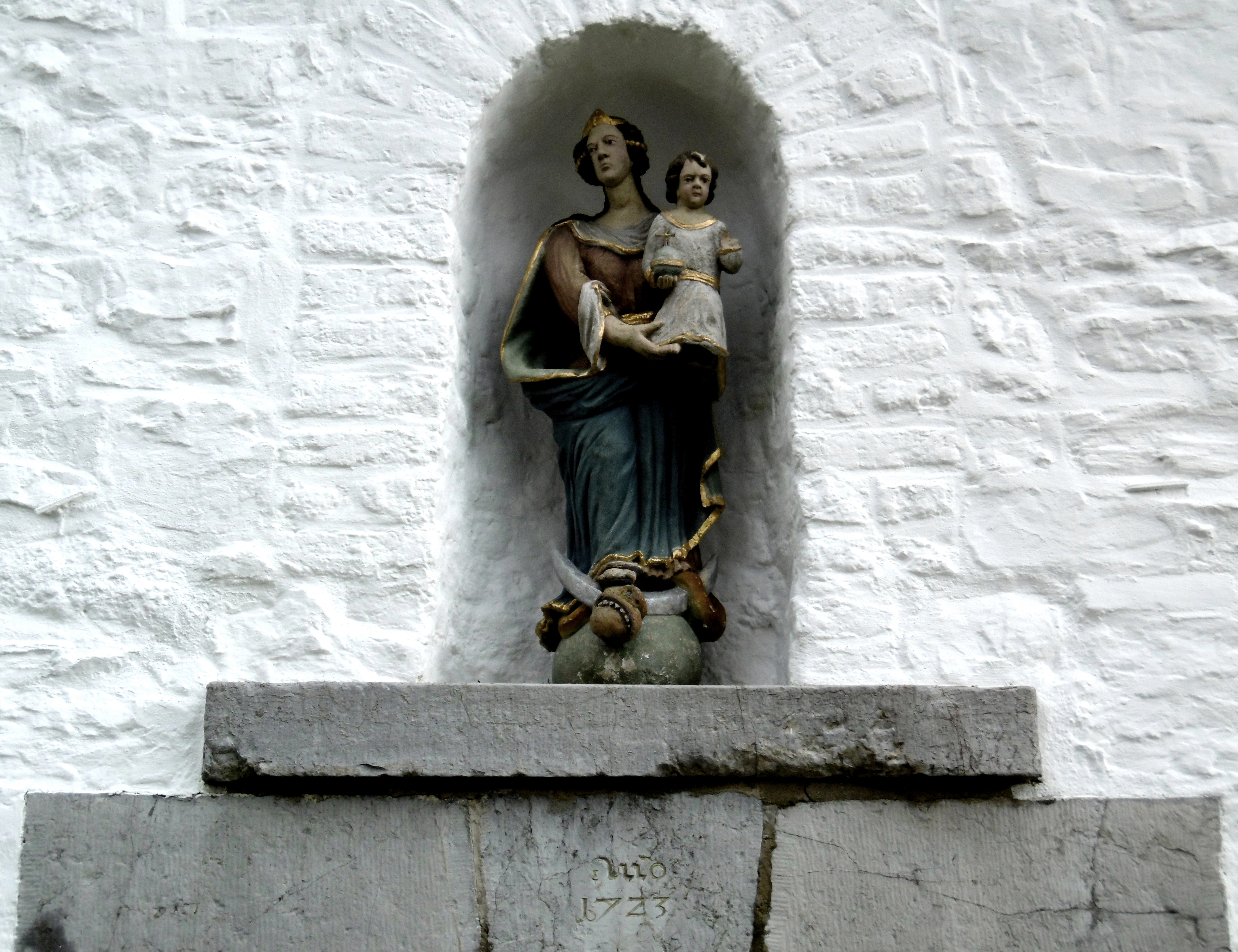 Marienfigur und Schlussstein (1723) an der Marienkapelle in Roetgen